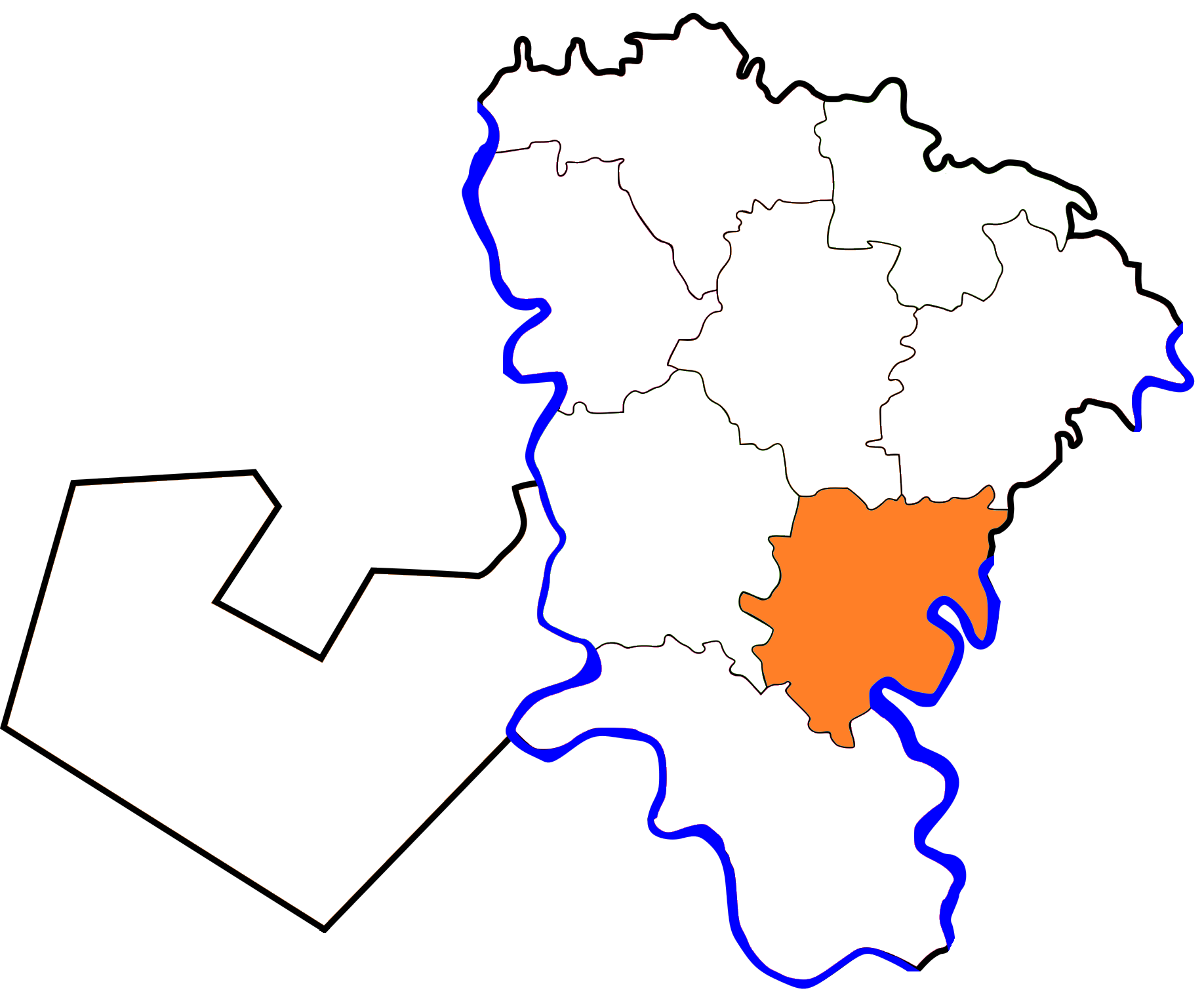 خريطة مركز الباجور بالنسبة لمحافظة المنوفية، مصر.